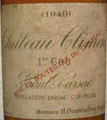 Château Climens 1949 label